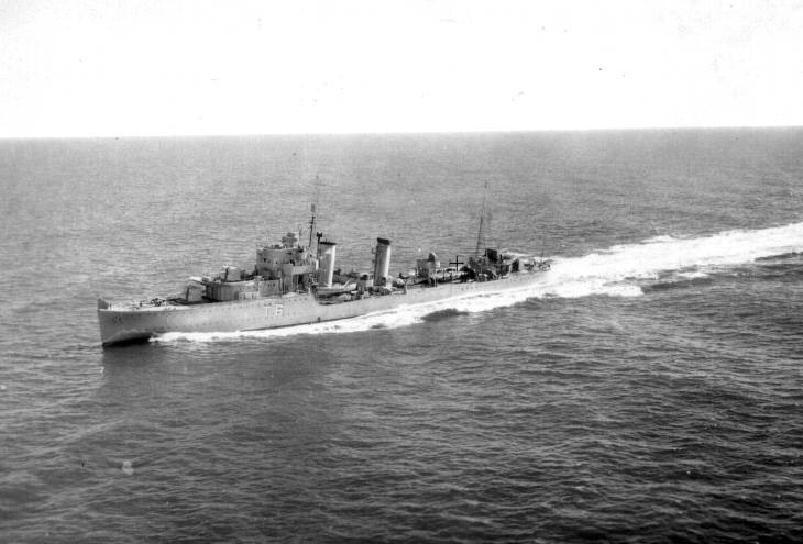 ARA Buenos Aires